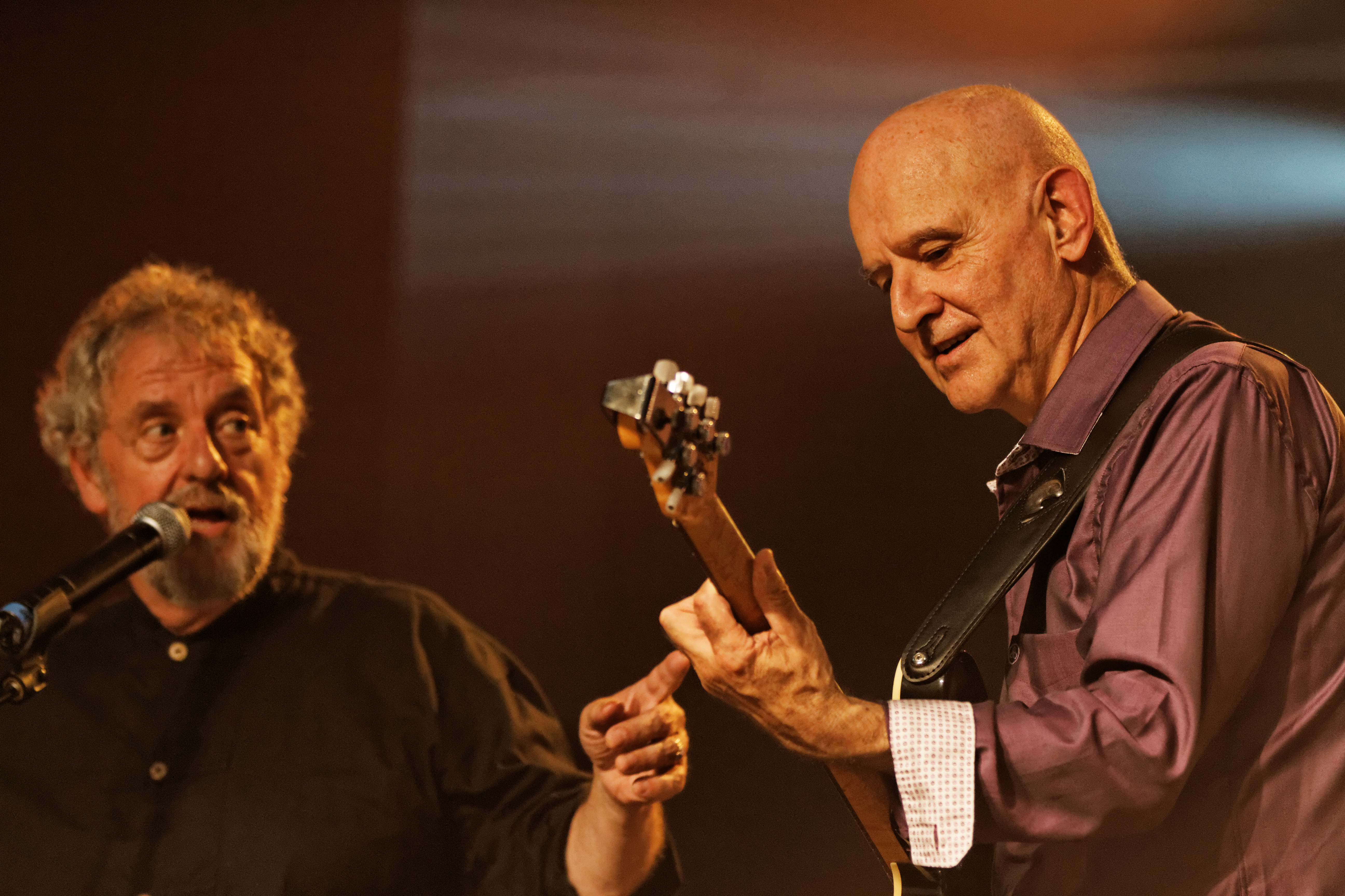 Dan ar Braz en concert sur la scène Gradlon lors du festival de Cornouaille 2013.